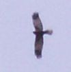 circus aeruginosus, male